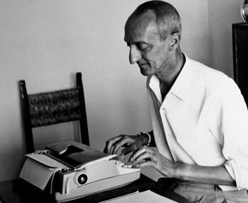 Giorgio Scerbanenco durante la scrittura di un suo testo